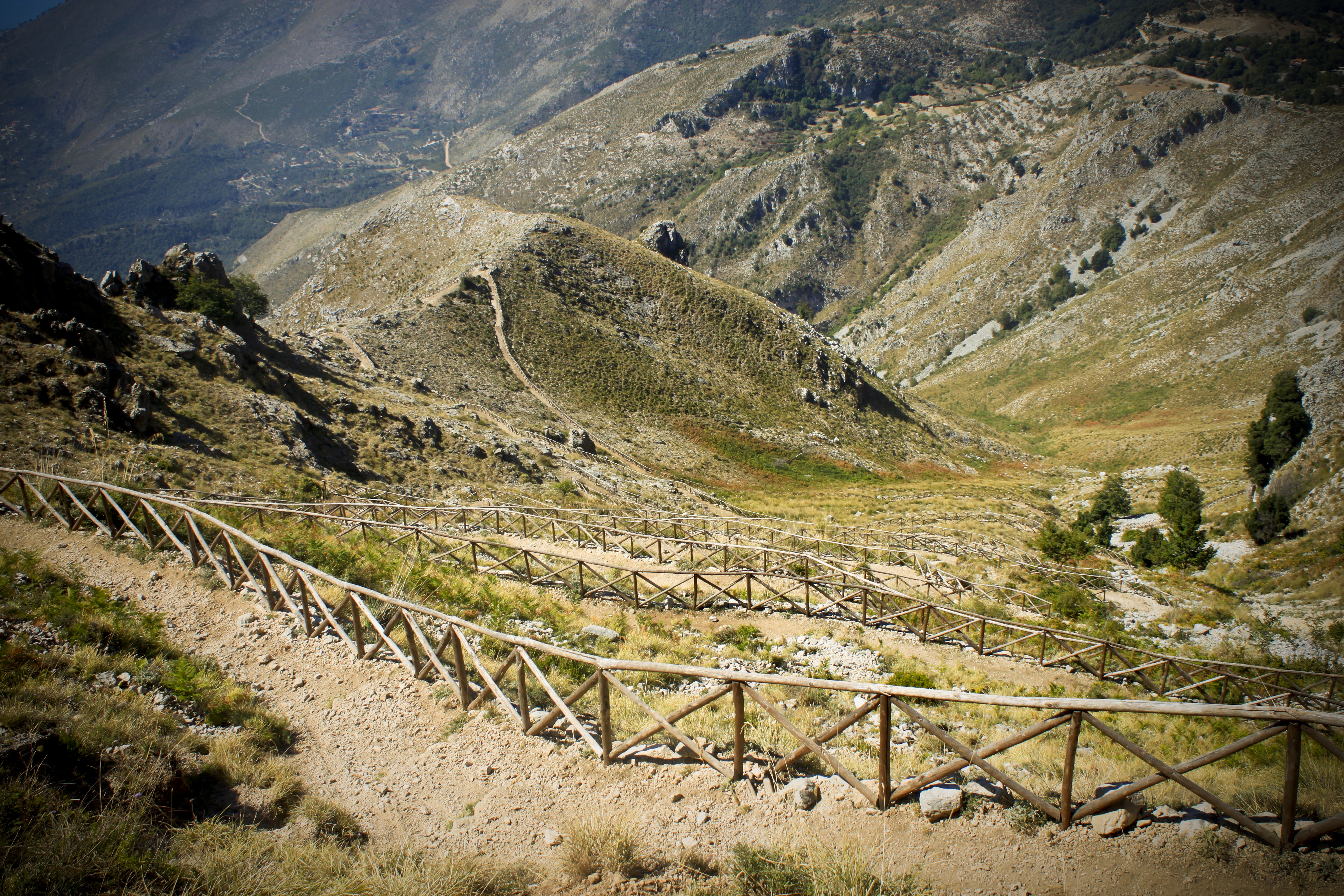 Fotografia di Gabriele Altimari